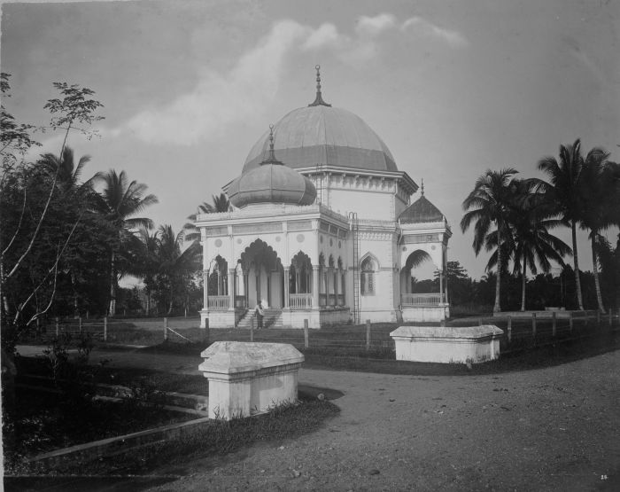 foto. Moskee te Bindjai